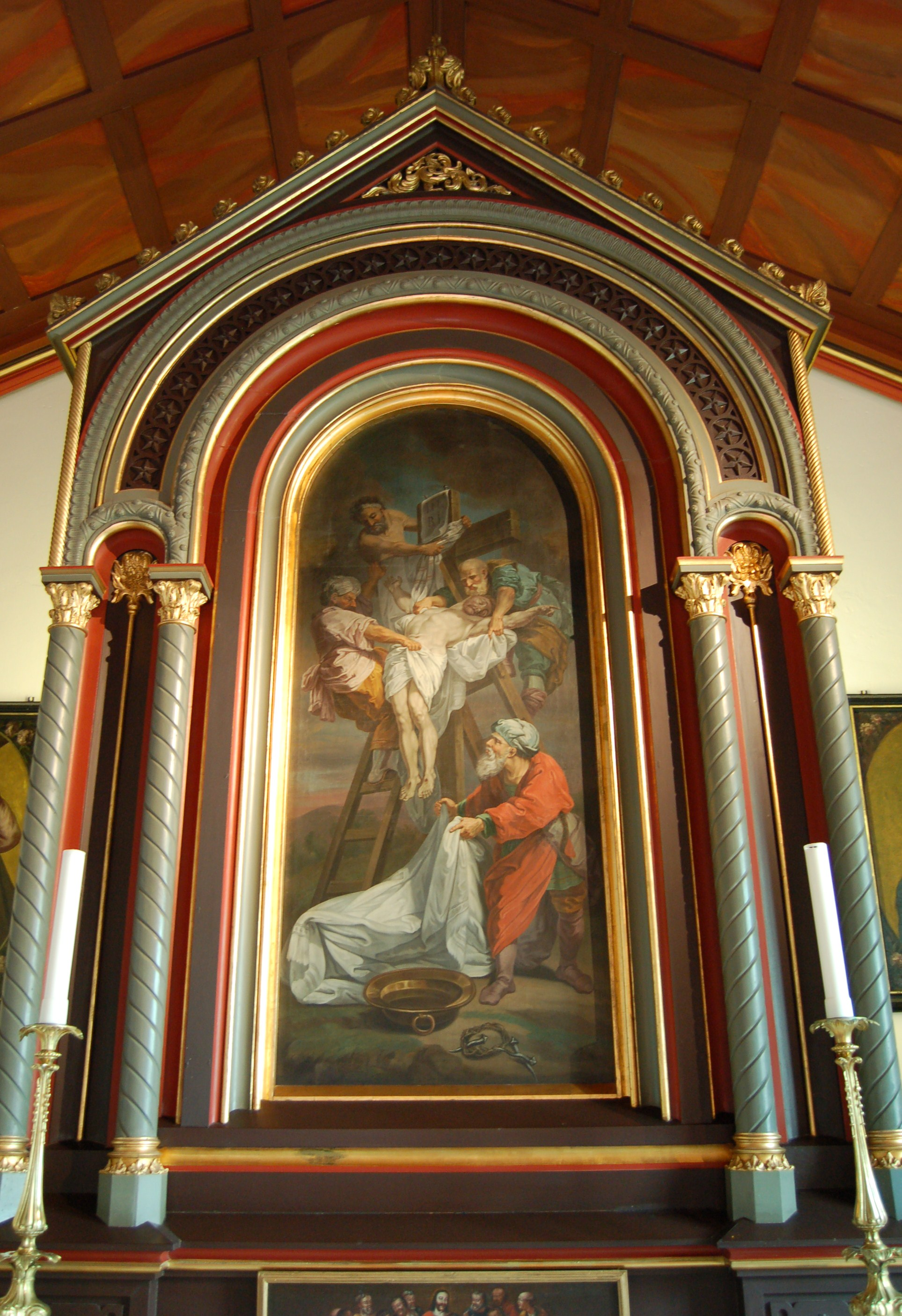 Altermaleri av Ernst Heinrich Løffler (1723-1796), 1752 "Nedtagelsen av korset" - i Larvik kirke.